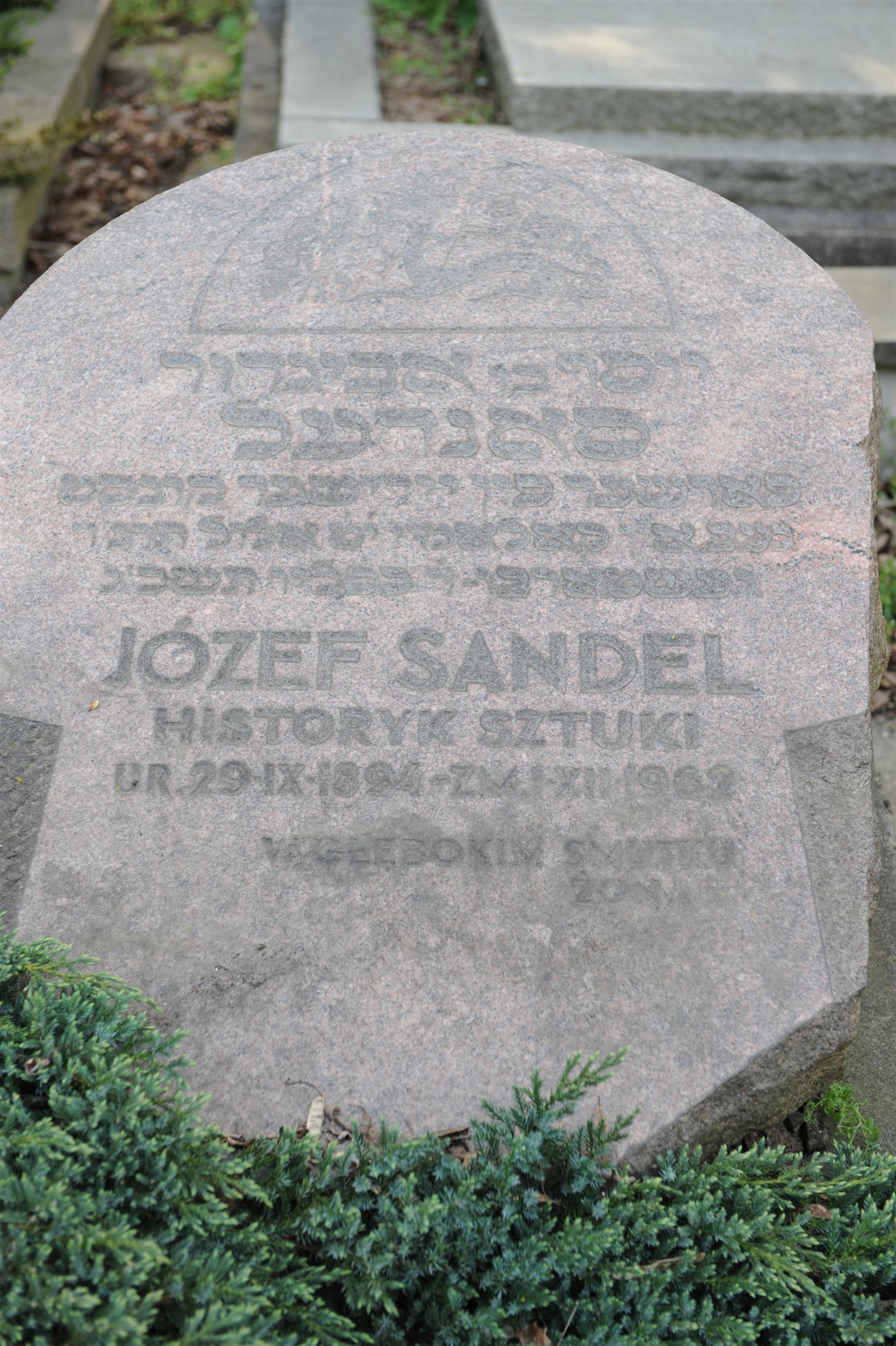 Grób Józefa Sandela na Cmentarzu Żydowskim w Warszawie